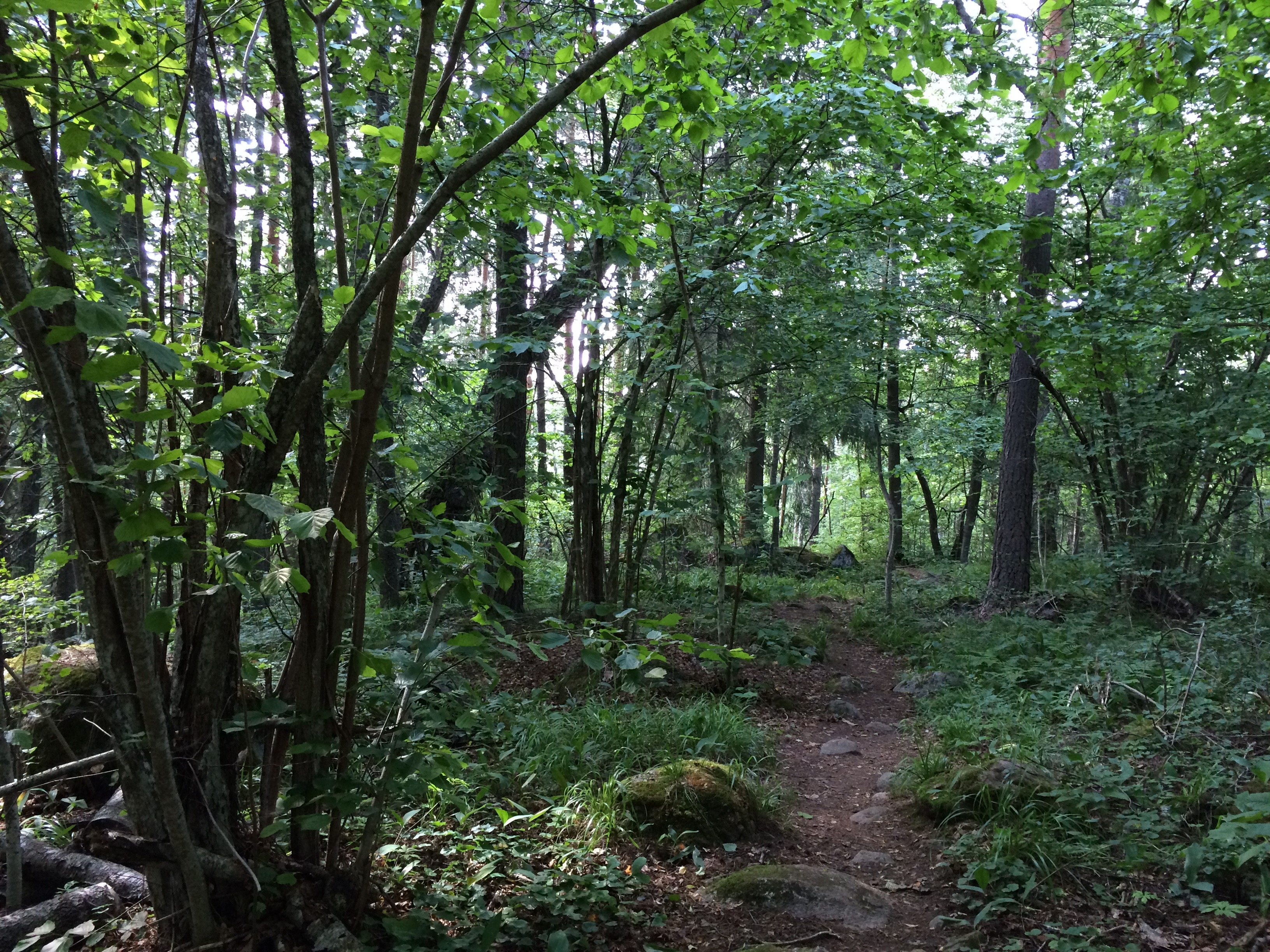 Untulanharjun lehtometsää ja luontopolku Hämeenlinnan Lammilla. Pähkinäpensas mm. etuvasemmalla.